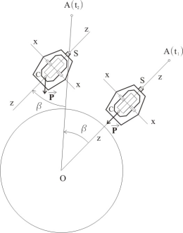 Земята гледана от точка над Северния полюс